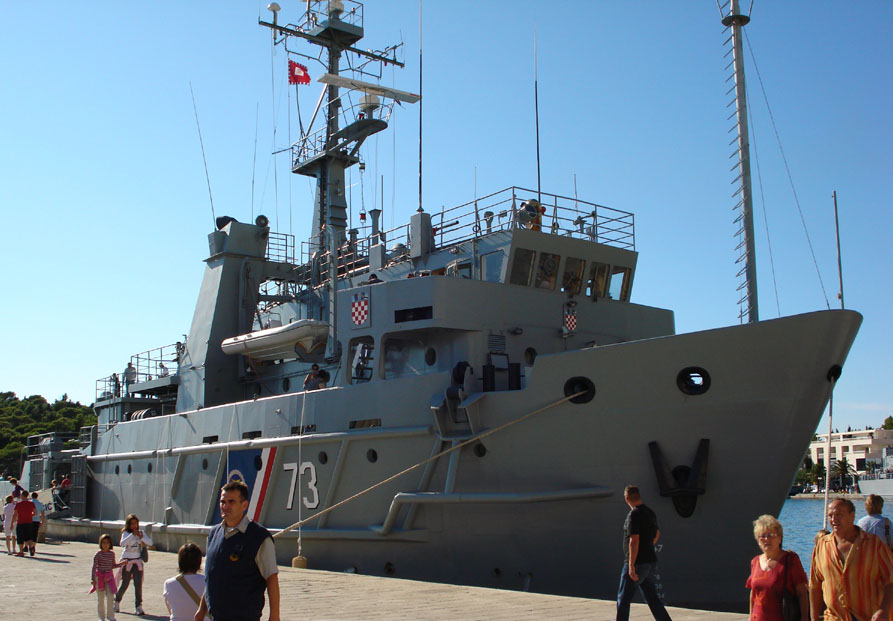 BS-73 Faust Vrančić